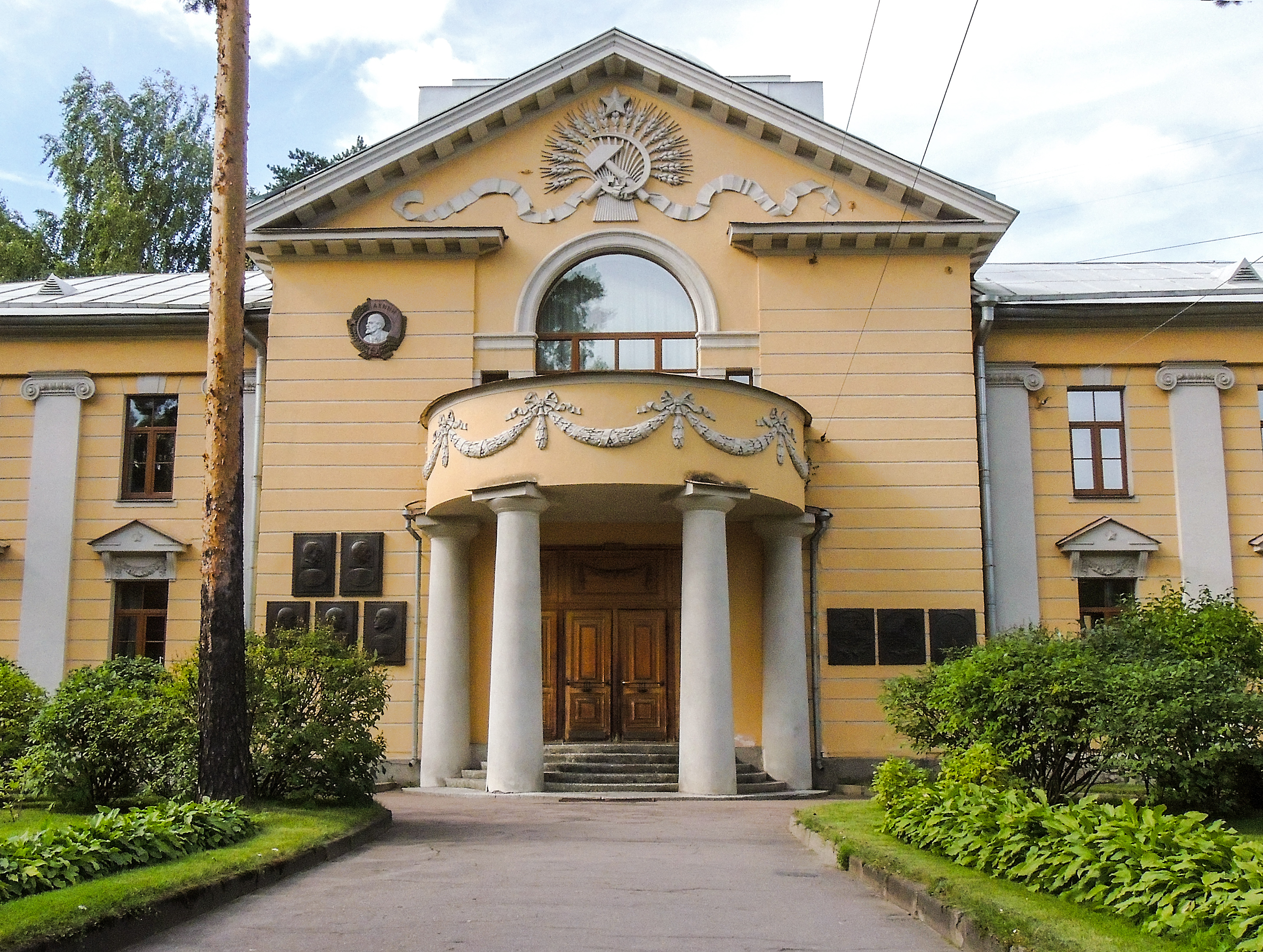 Убежище для престарелых неимущих потомственных дворян Санкт-Петербургской губернии в память 300-летия царствования Дома Романовых: Политехническая улица, 26, улица Курчатова, Гомельская улица, Выборгский район, Санкт-Петербург